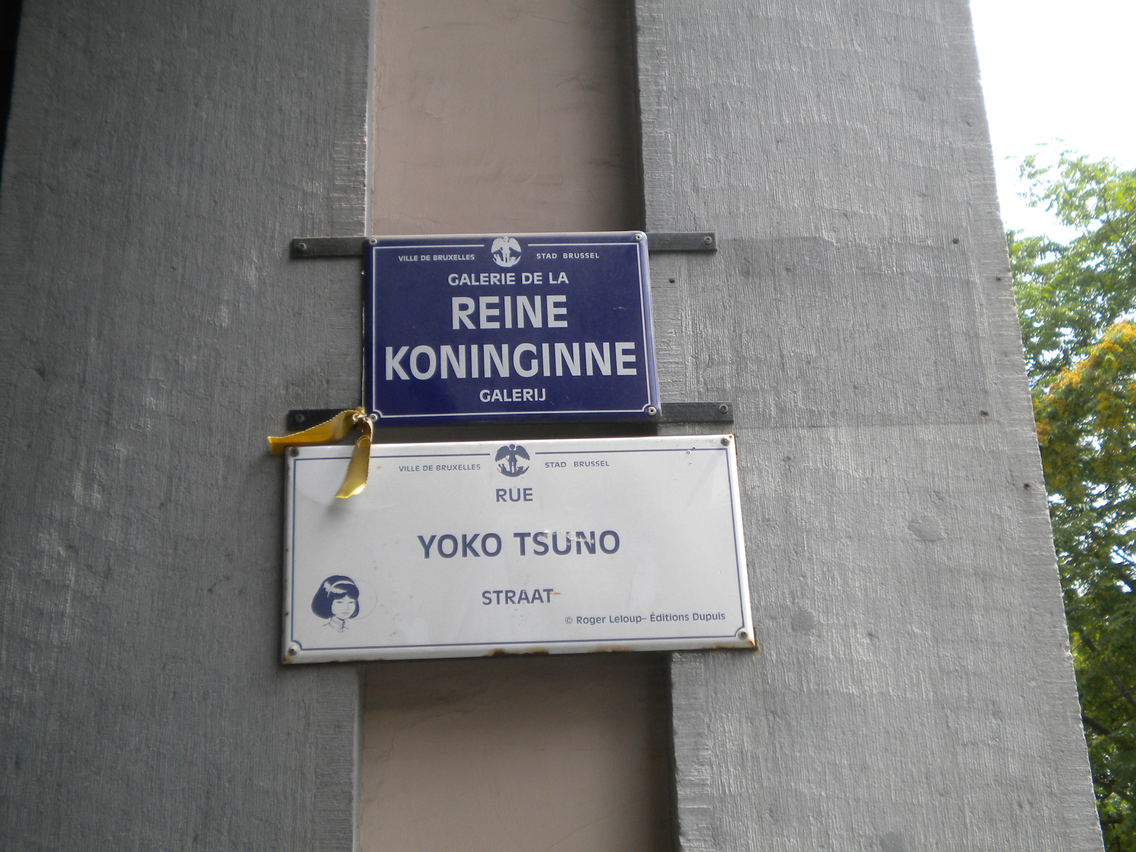 Plaque de la rue Yoko Tsuno à Bruxelles.